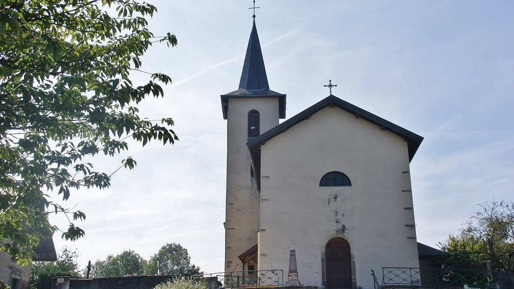 est un petit village situe dans le departement de la Savoie